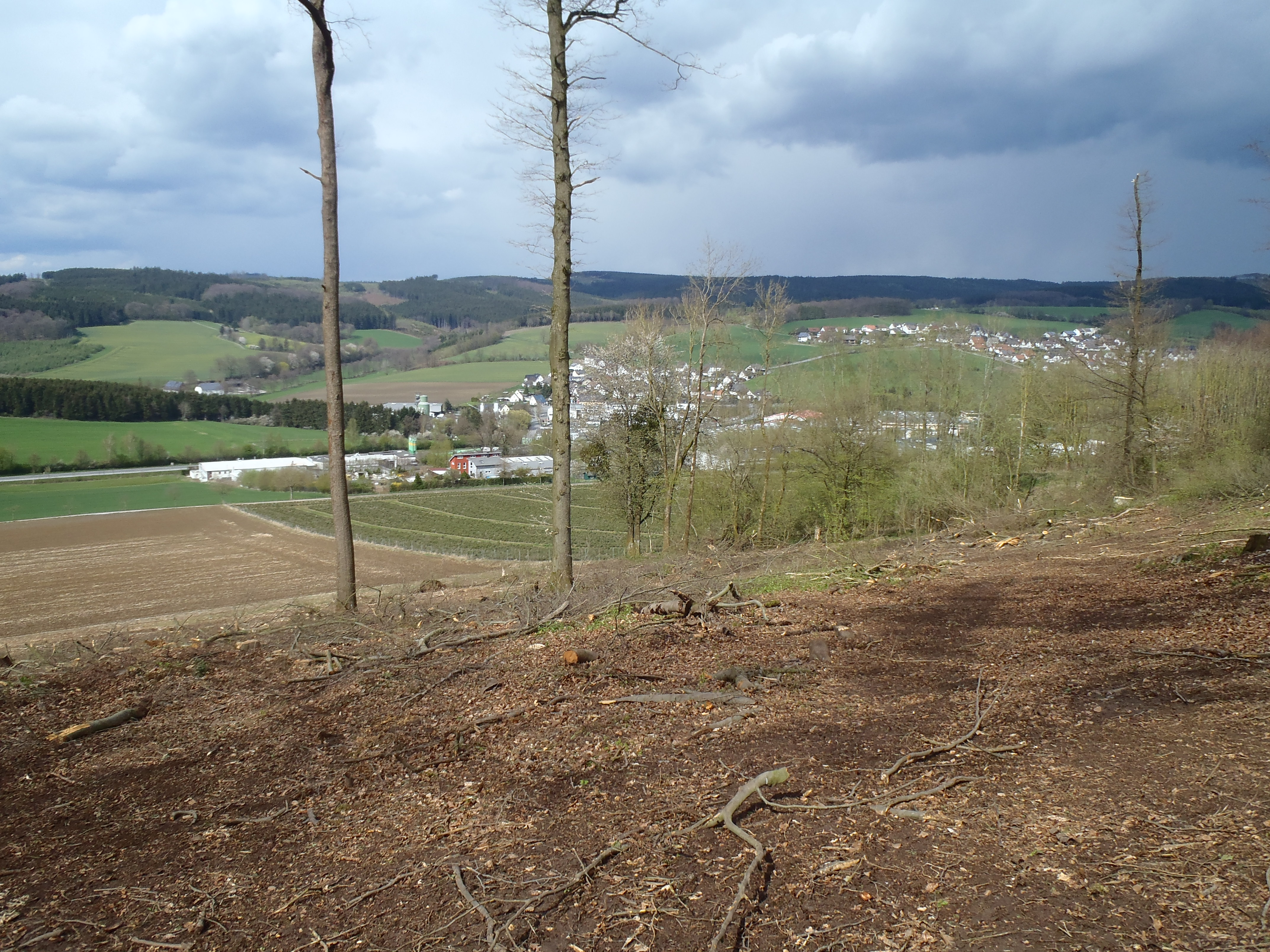 Das 2019 ausgewiesene Naturschutzgebiet Kalkbuchenwald Selschede im Mai 2017 im Vordergrund, noch ohne Schutzstatus. Gerodete Buchenwaldparzelle auf der später Fichten gepflanzt wurden. Hinten ist links ist Westenfeld und rechts Bainghausen zu sehen.